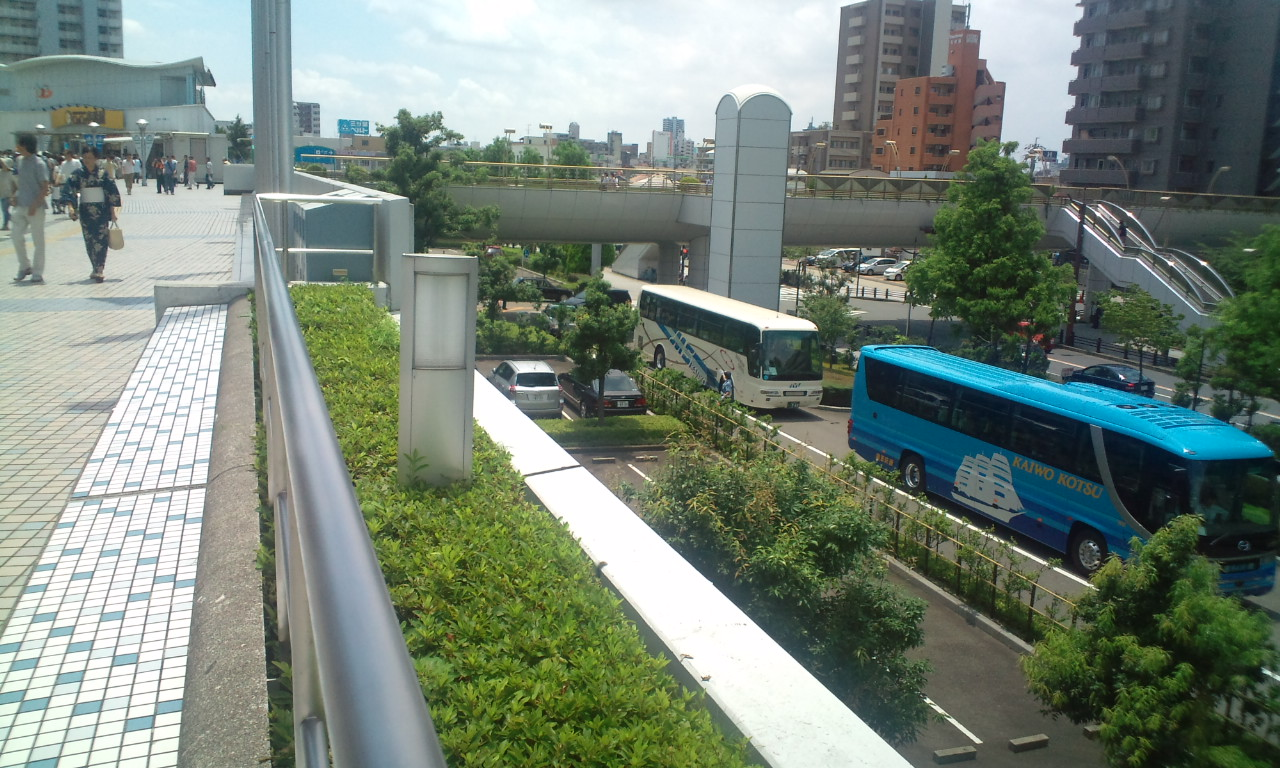 名古屋ドームから